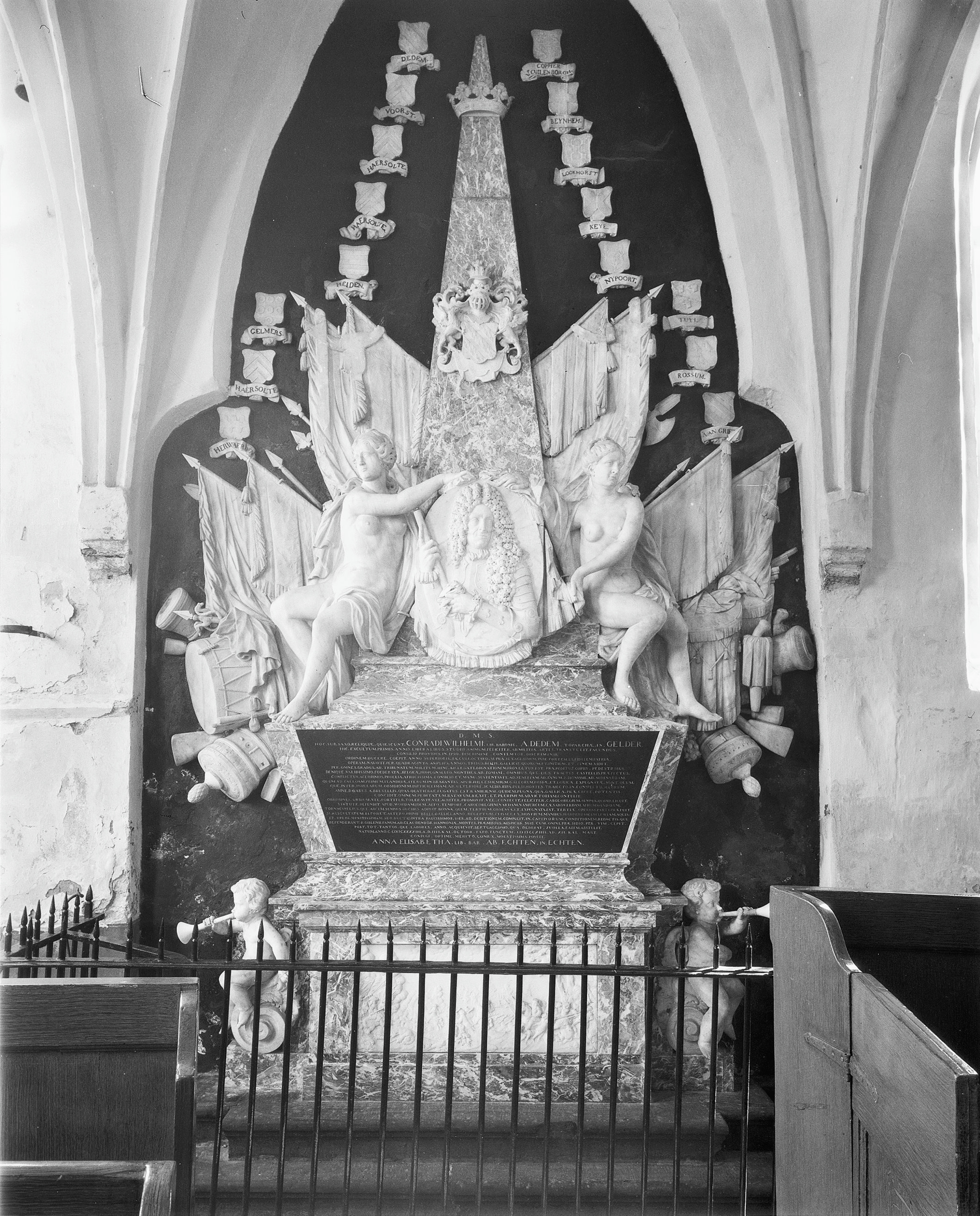 Nederlands Hervormde Kerk en Toren: grafmonument